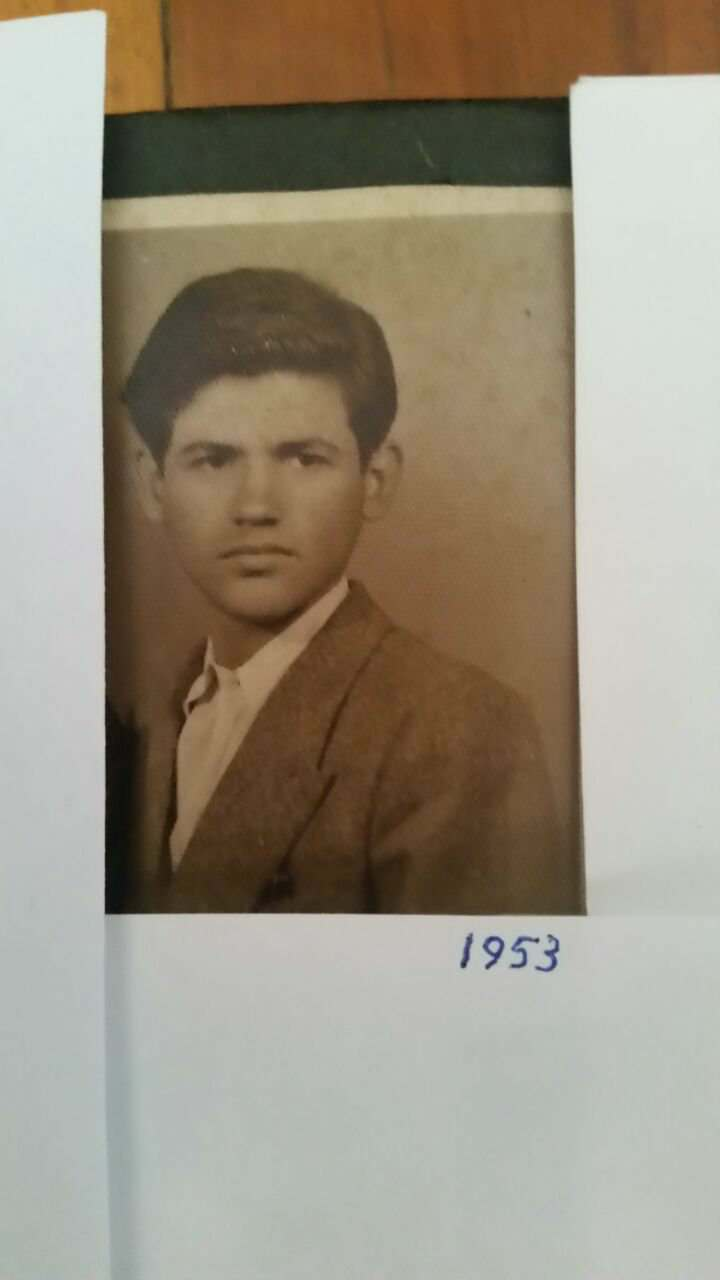 immagini 2